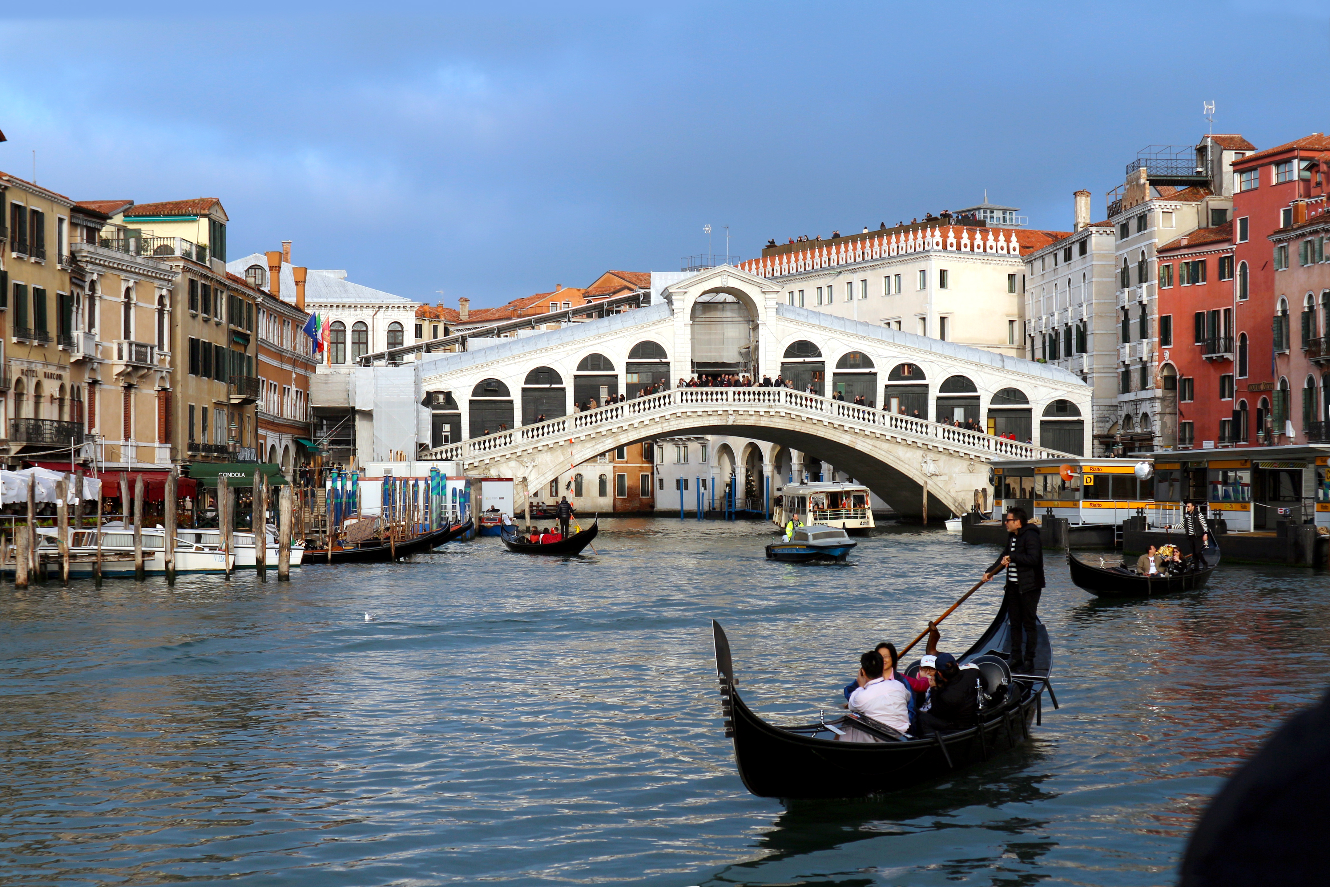 Rialtobrücke in Venedig, früher die einzige Brücke über den Canale Grande